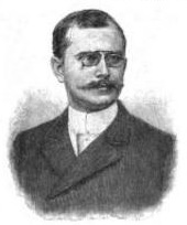 Der deutsche Ozeanograf Gerhard Schott (1866-1961)